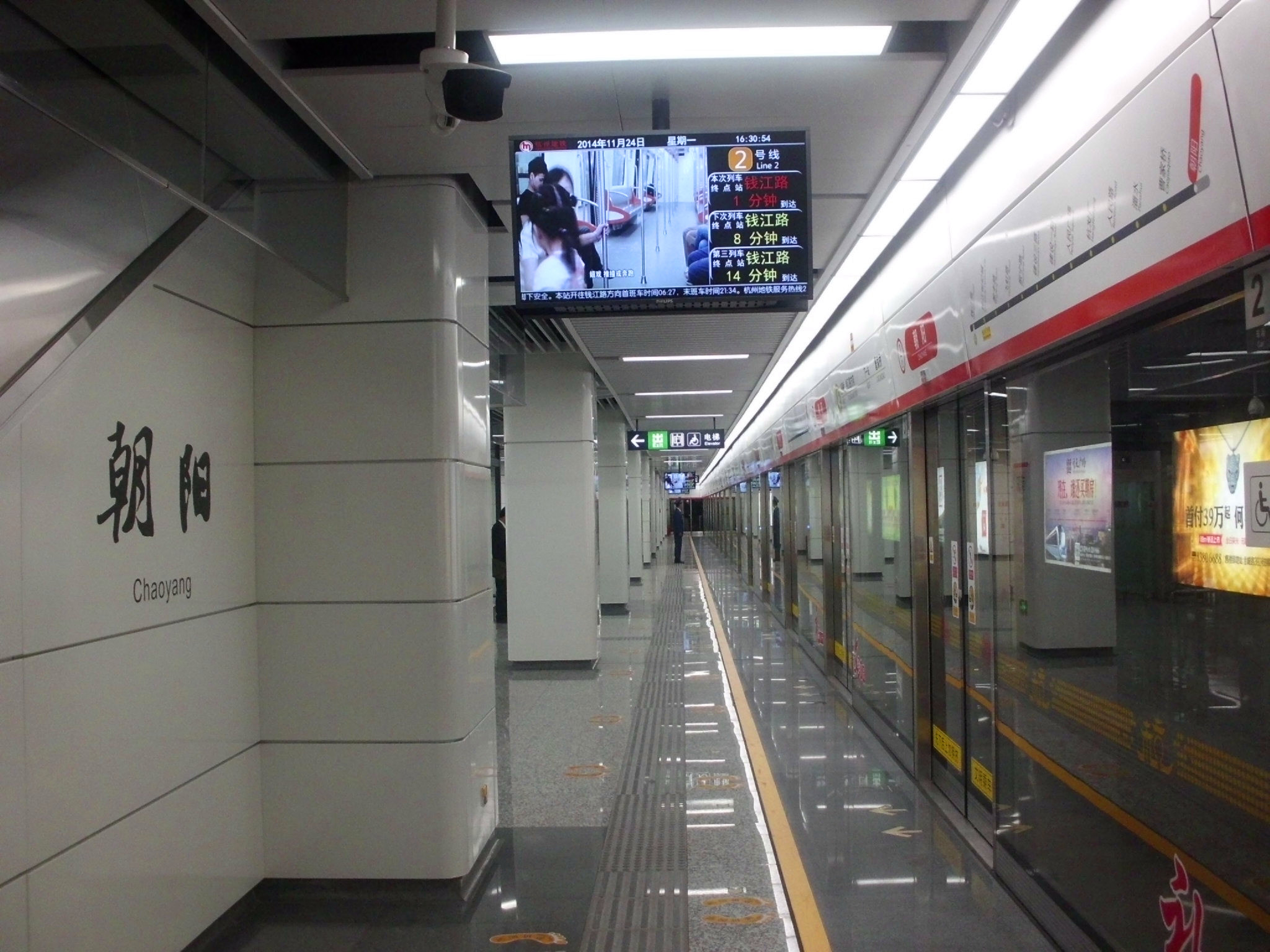 2号线朝阳站